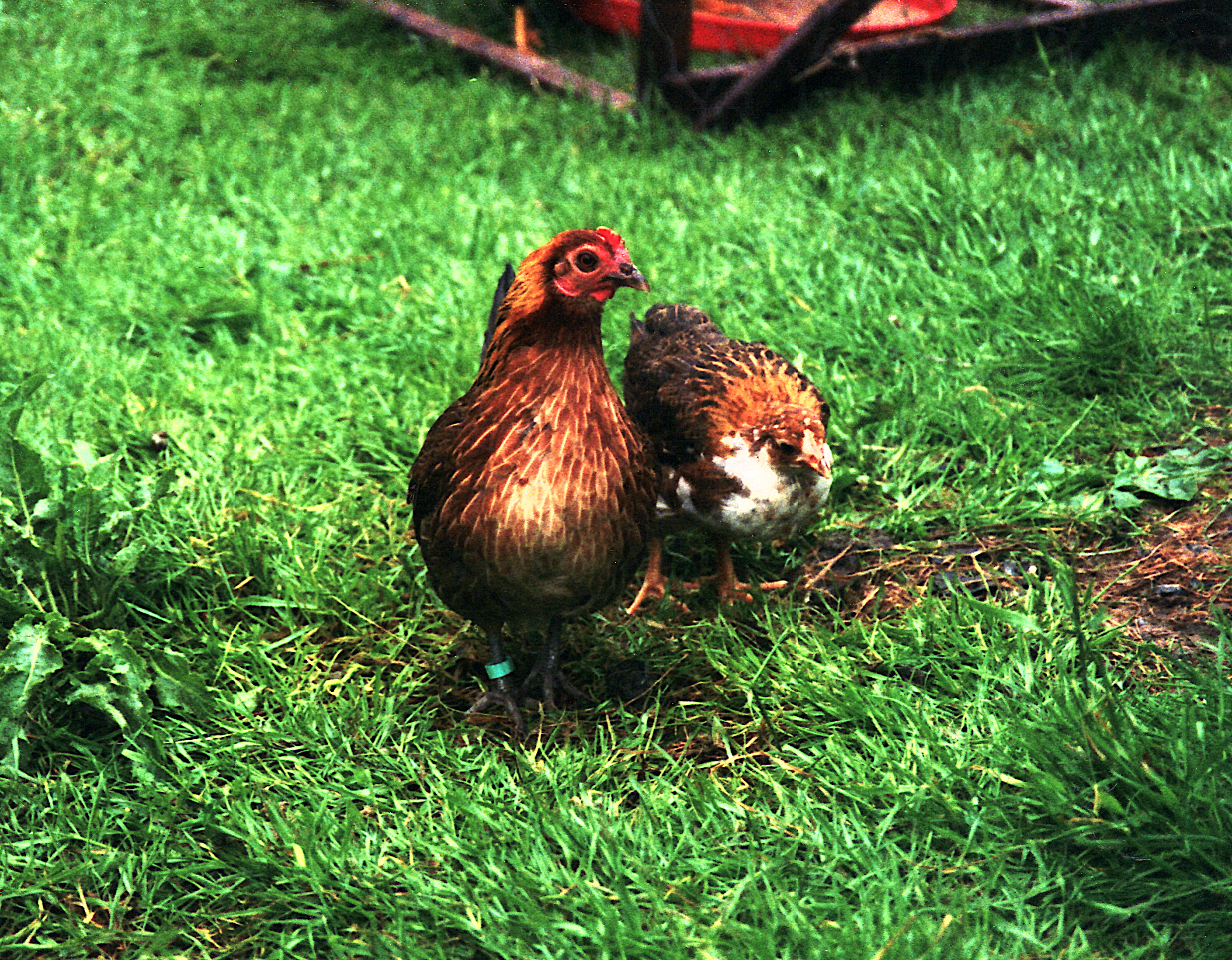 Svensk dvärg-höna med adoptivkyckling (normalstor ras). Plats: Kimmersbo, Lindome, juni 1999.